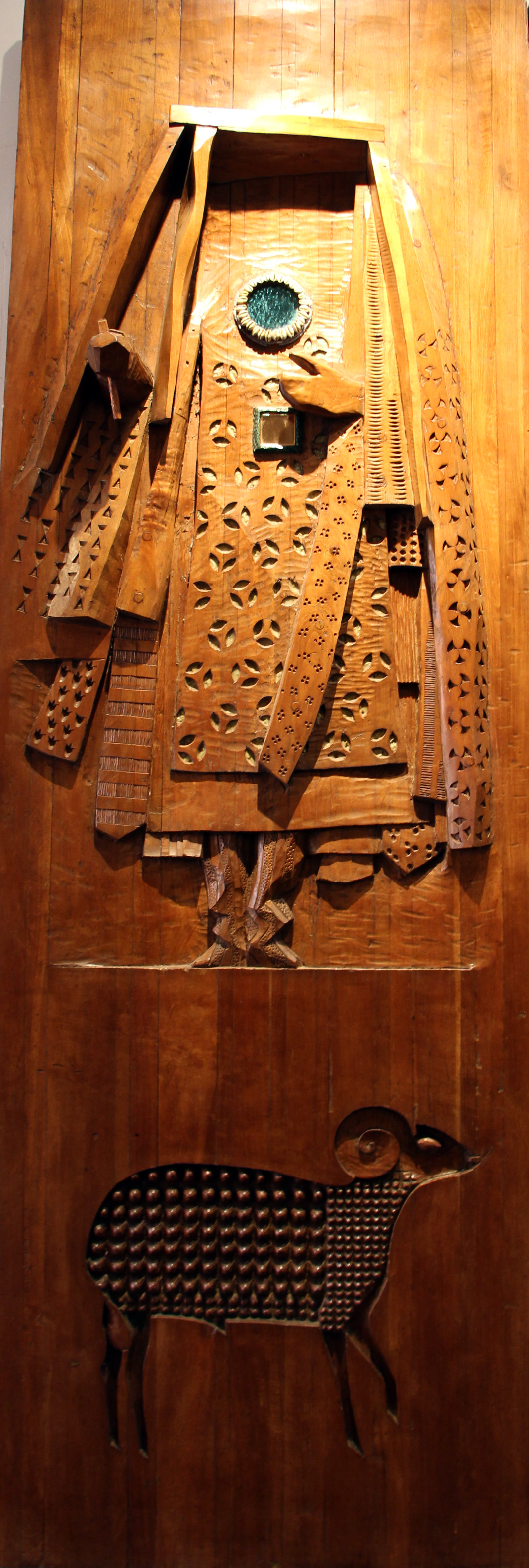 Candomblé nel Museu Afro-Brasileiro, Salvador